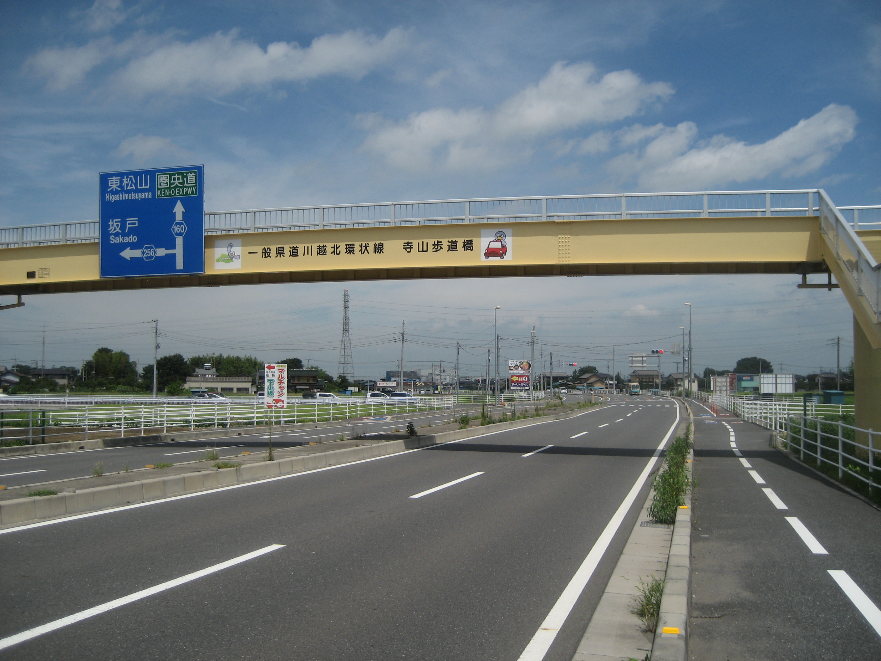 埼玉県道160号線川越市寺山歩道橋付近（国道254号線方面を撮影）